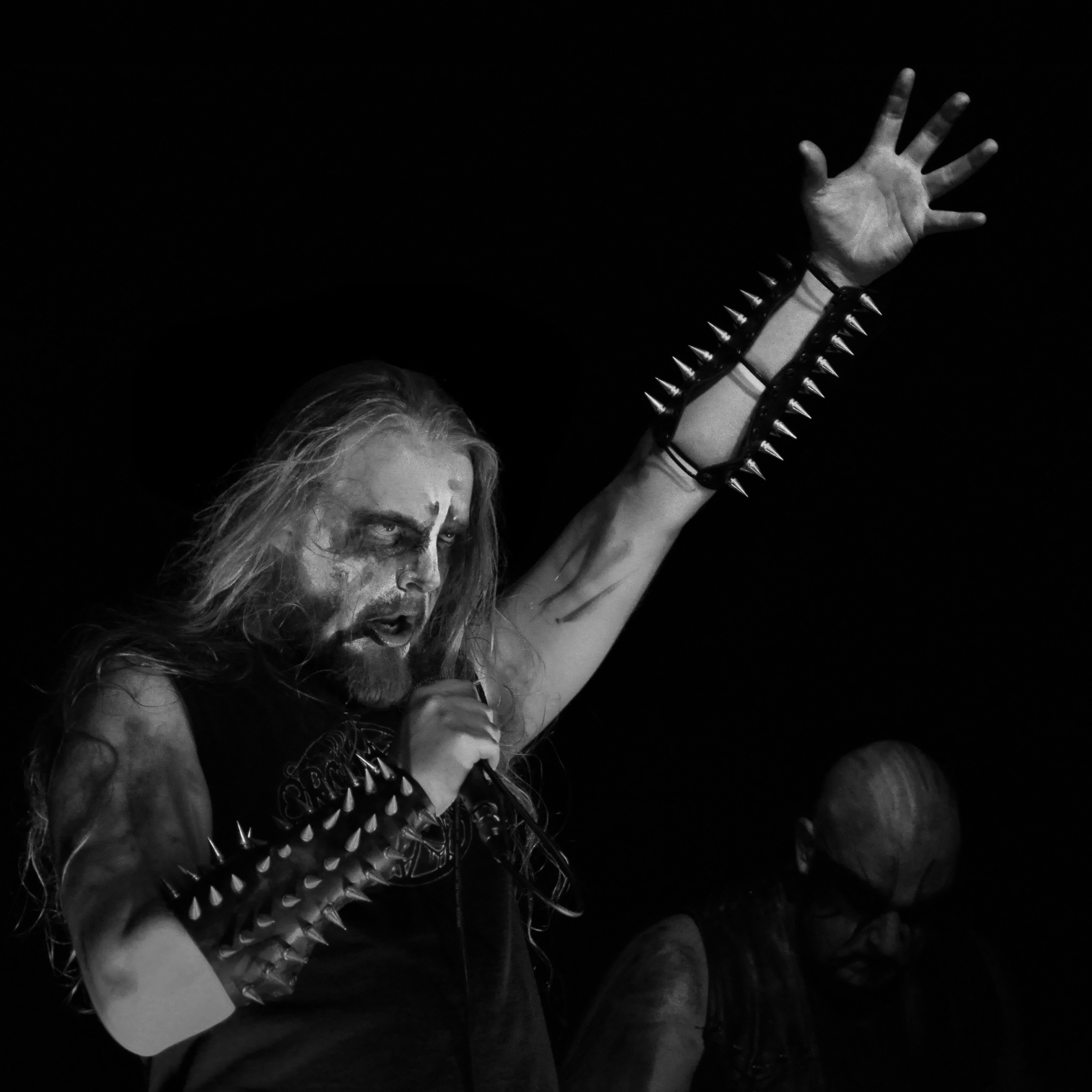 Setherial playing at the Igel Rock in Valenciennes (France), on the 12th of September 2010.